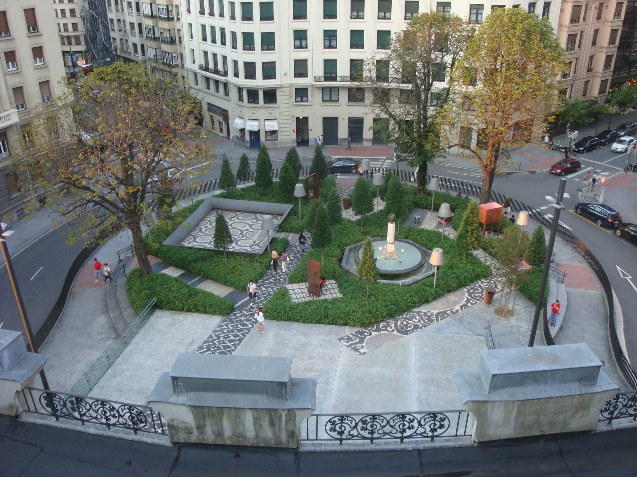 Centre culturel et de loisirs Alhondiga, Bilbao, P. Starck